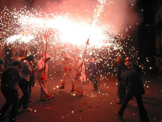 Correfocs